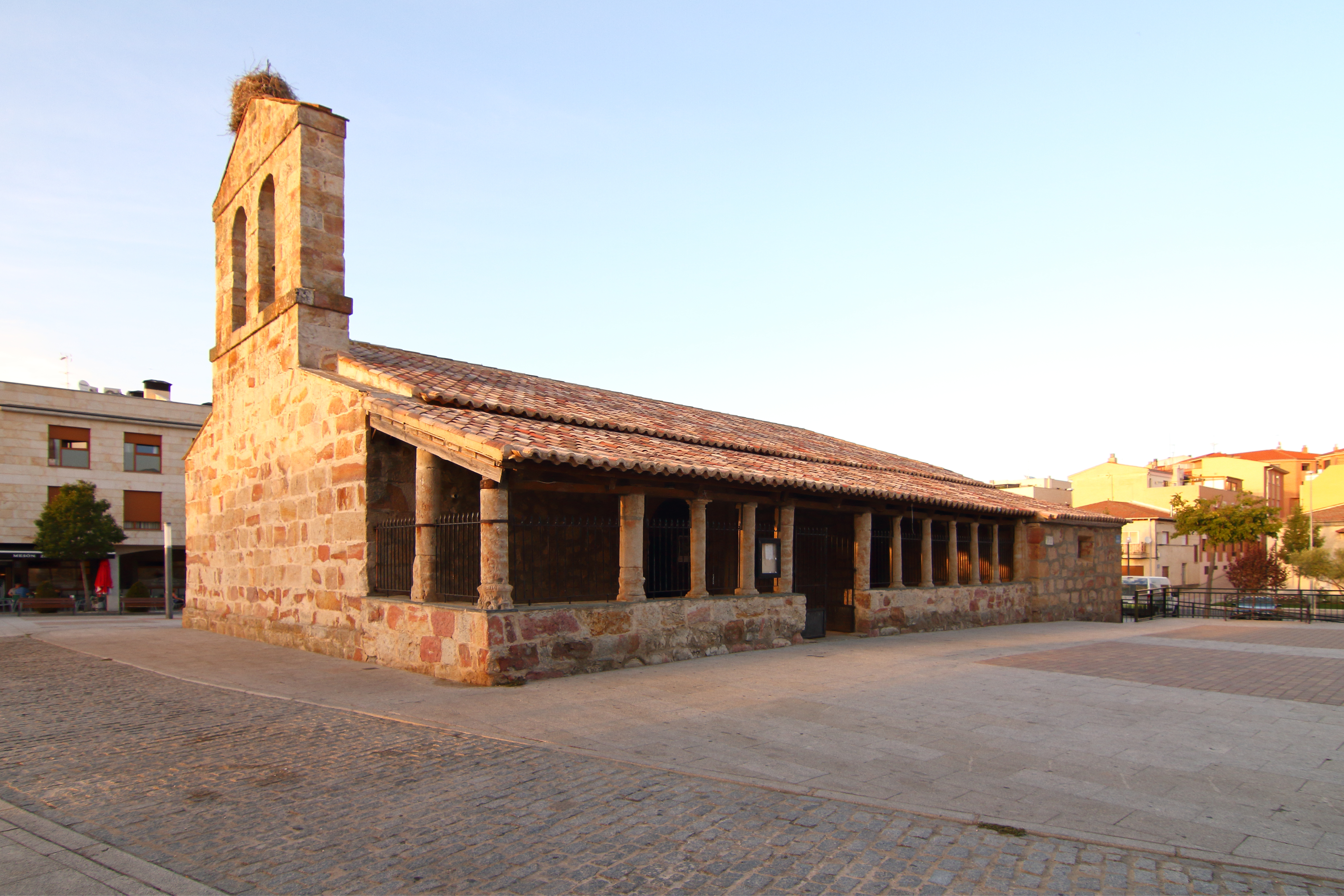 Iglesia de Ntra. Sra. de la Asunción en Carbajosa de la Sagrada